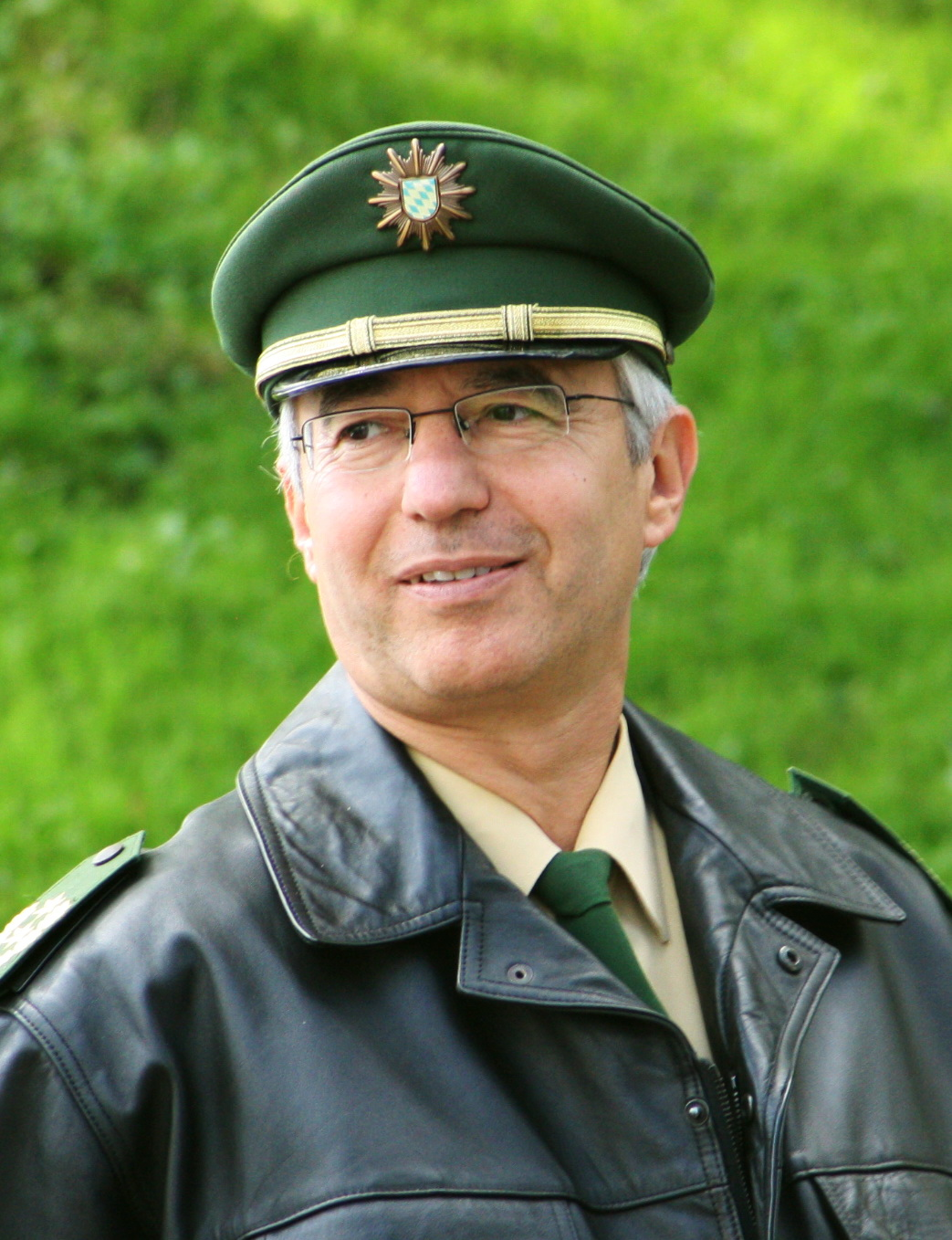 Wilhelm Schmidbauer - Polizeipräsident von München.